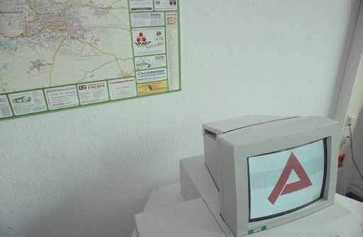 Arbeitsamt